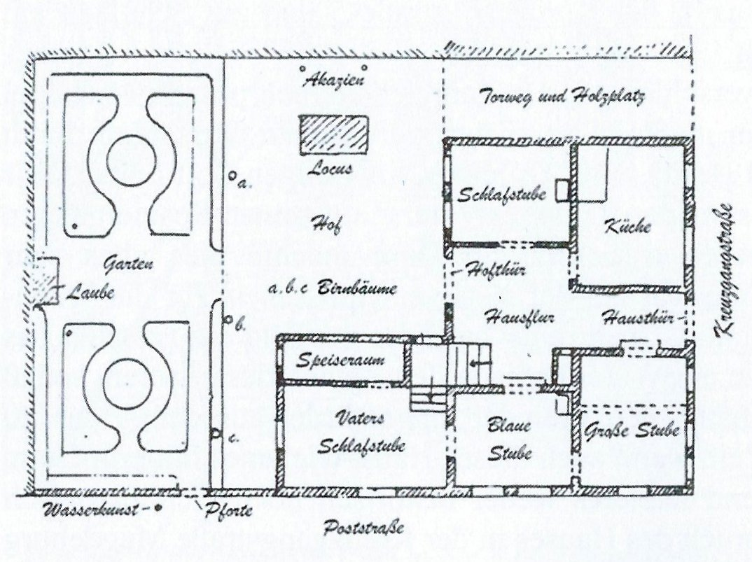 Kreuzgangstraße 5 in Magdeburg Grundriss Erdgeschoss 1840er